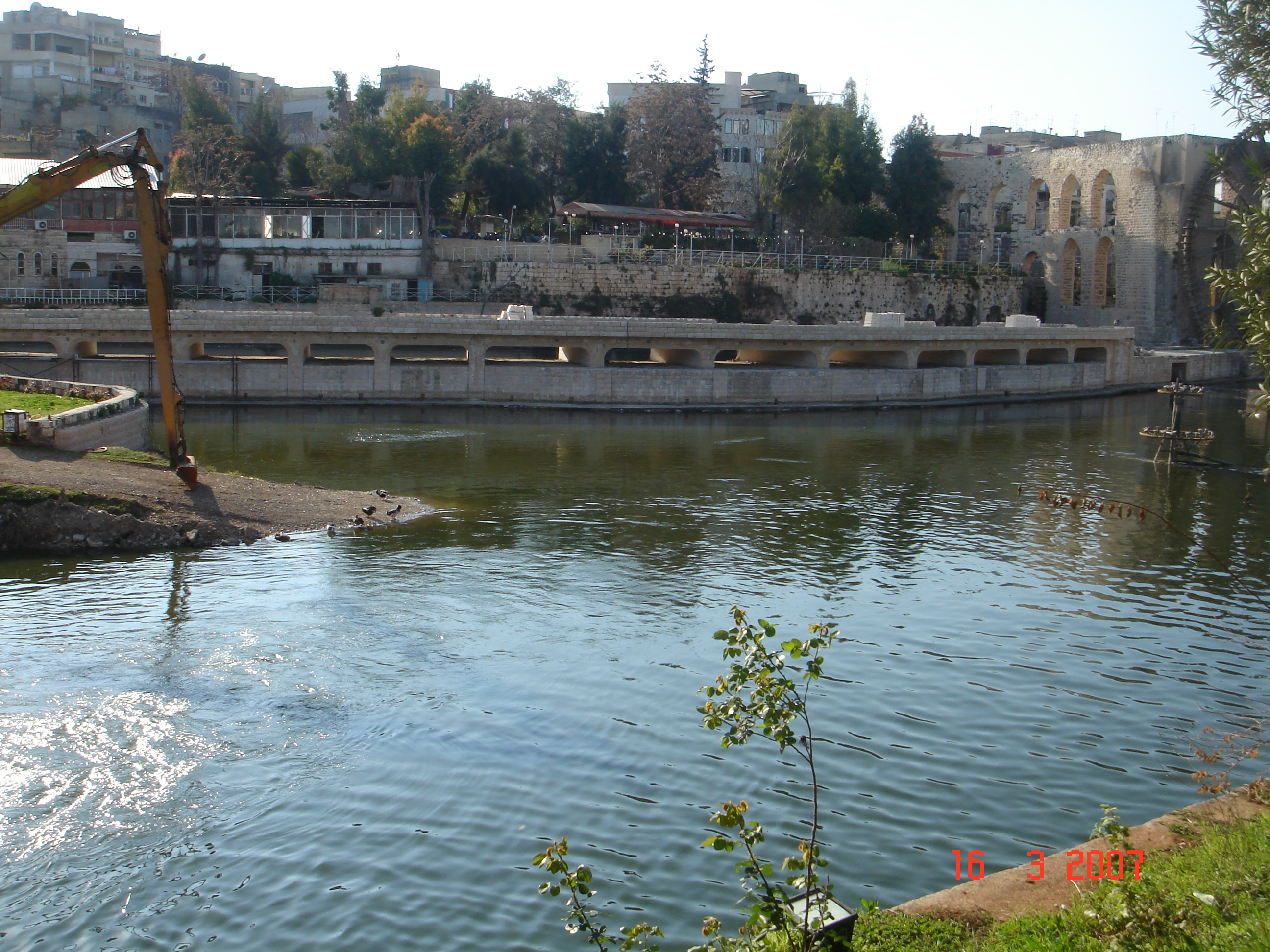 ハマーとオロンテス川.